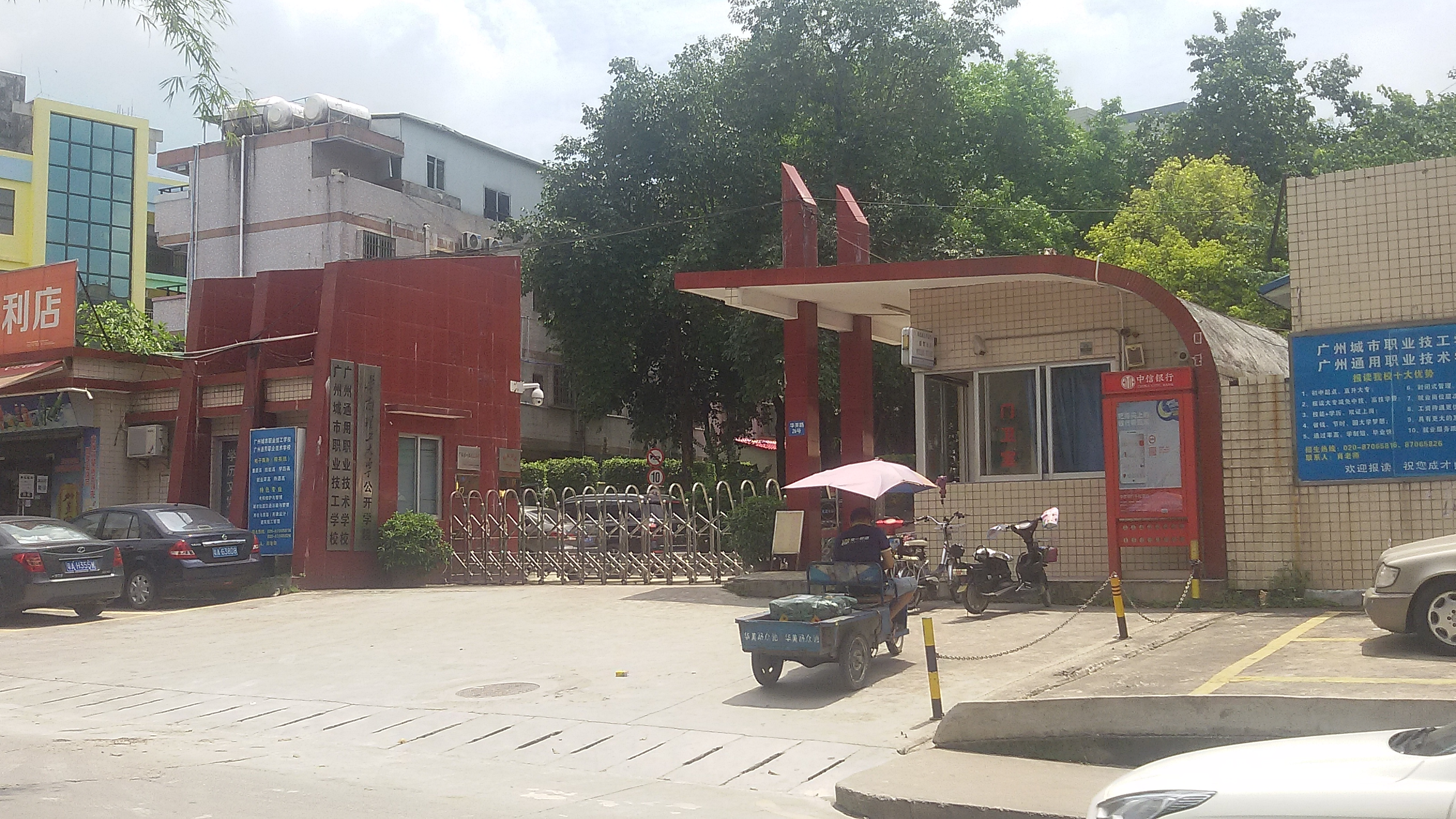 粵語: 廣州城市職業技工學校大門